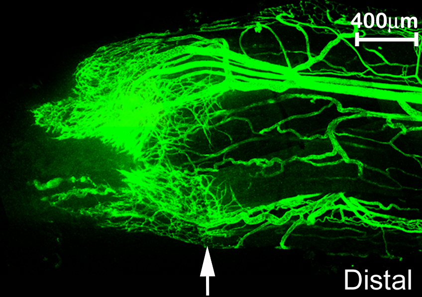 Vasa nervorum. Formación de vasos sanguineos luego de transección. Topografía de microvasos en Epineuro y Perineuro teñidos en verde con CD31 endotelial. Nervio ciático de rata, montado y teñido en totalidad